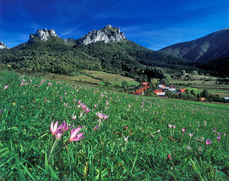 Štefanová